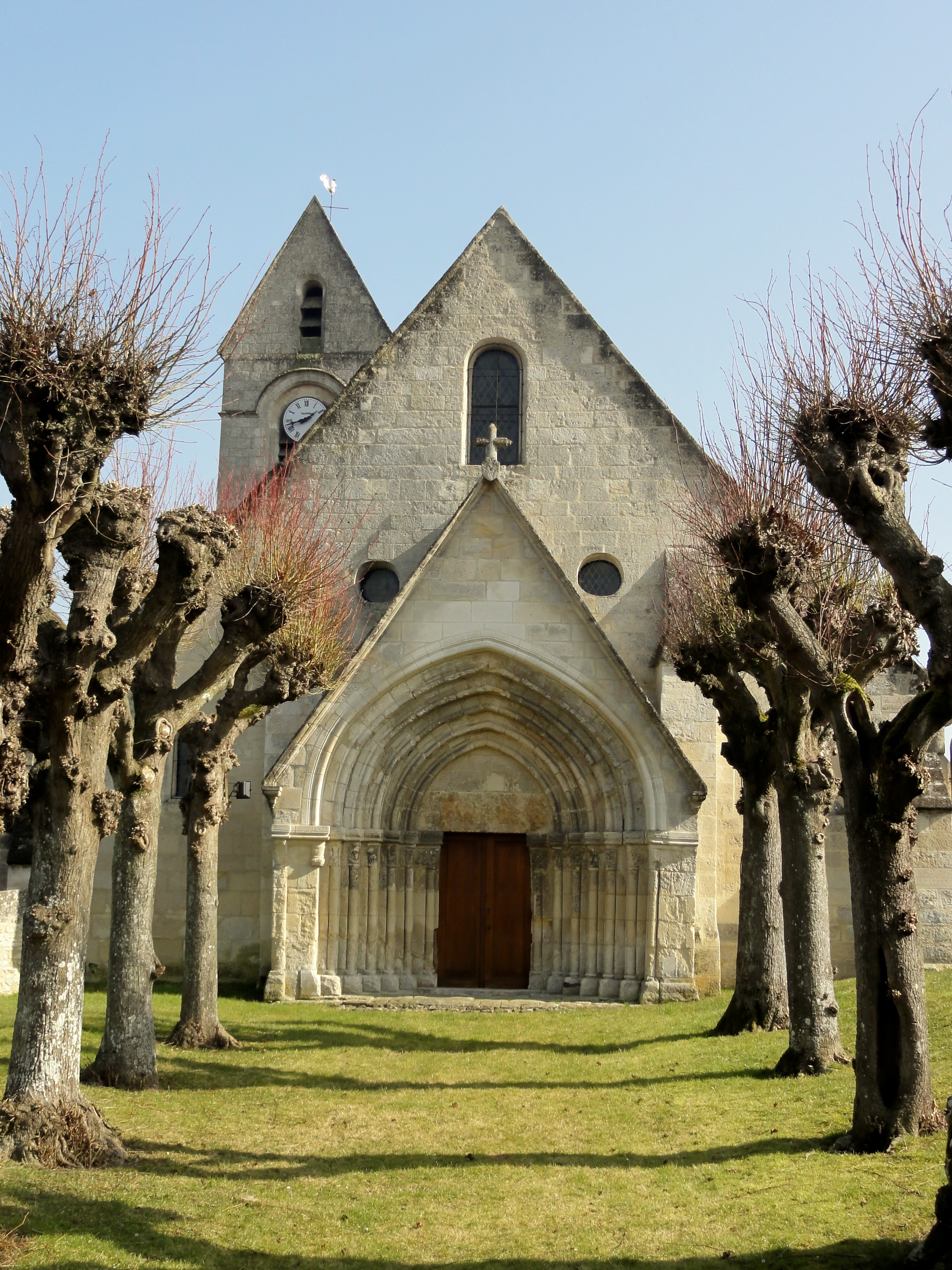 Façade occidentale.